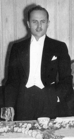 Detalle de una fotografía que muestra al productor cinematográfico Darryl F. Zanuck durante una cena celebrada celebrada en 1936b en honor de Adolph Zukor